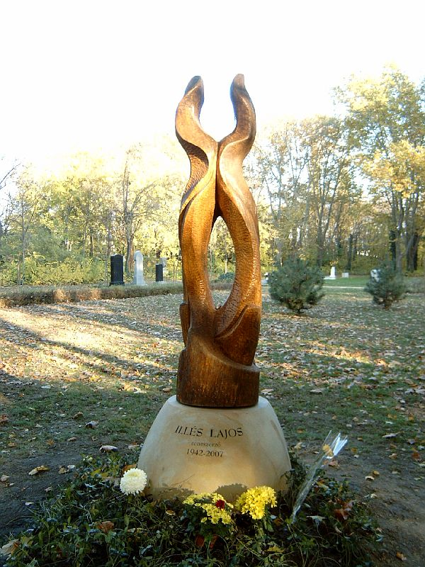 Illés Lajos (Budapest, 1942. március 18. – 2007. január 29.) magyar zenész, zeneszerző, énekes sírja Budapesten. Kerepesi temető: 41-2-18. A szobor Velkei József Lajos, a kőhalom Tóth Dávid szobrászművészek alkotása.